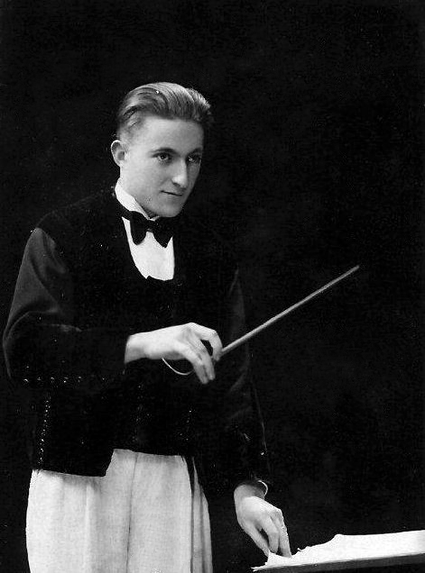 Jef Le Penven vers 1940, chef d'orchestre de l'Orchestre de Bretagne.